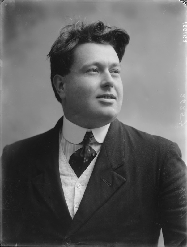 Baccio Maria Bacci